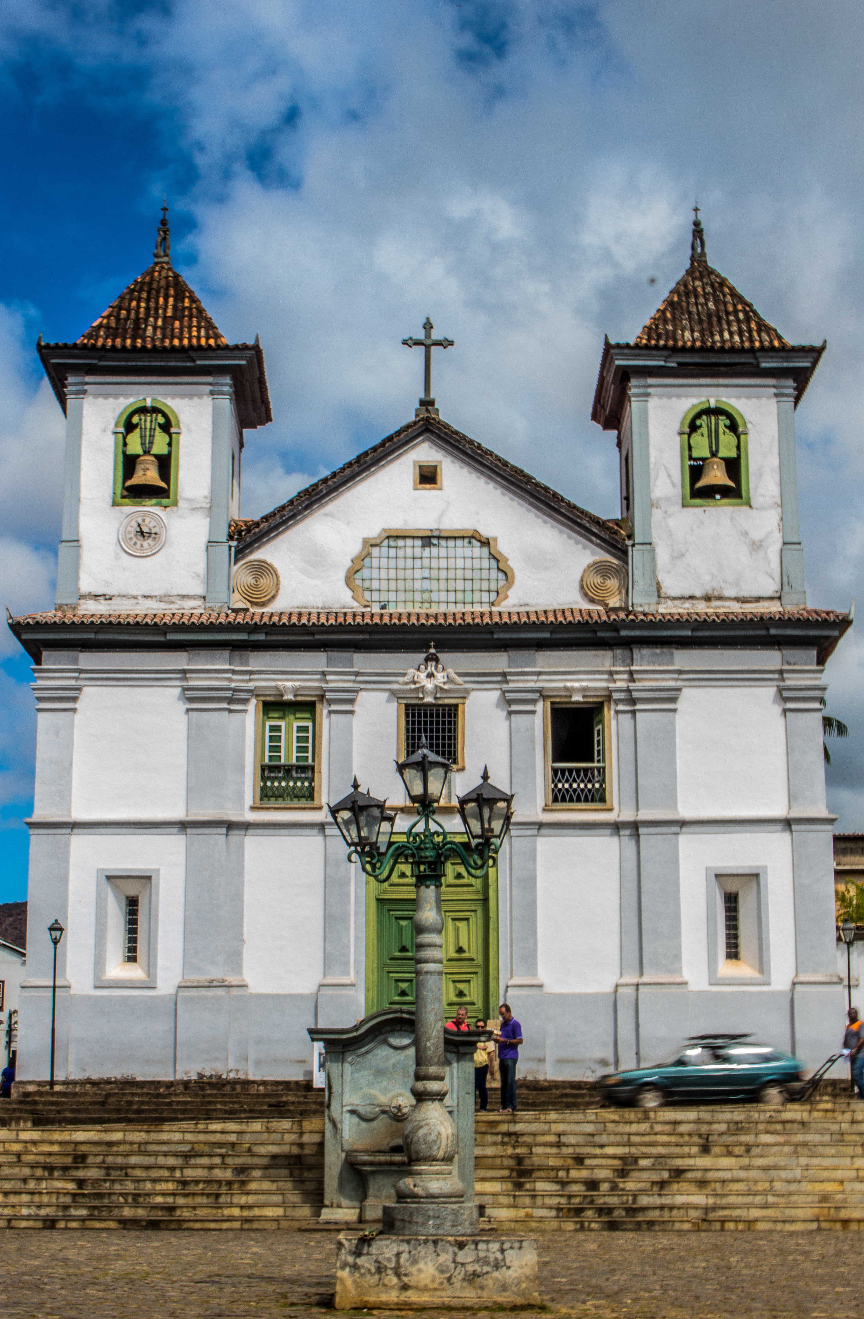 Igreja da Sé